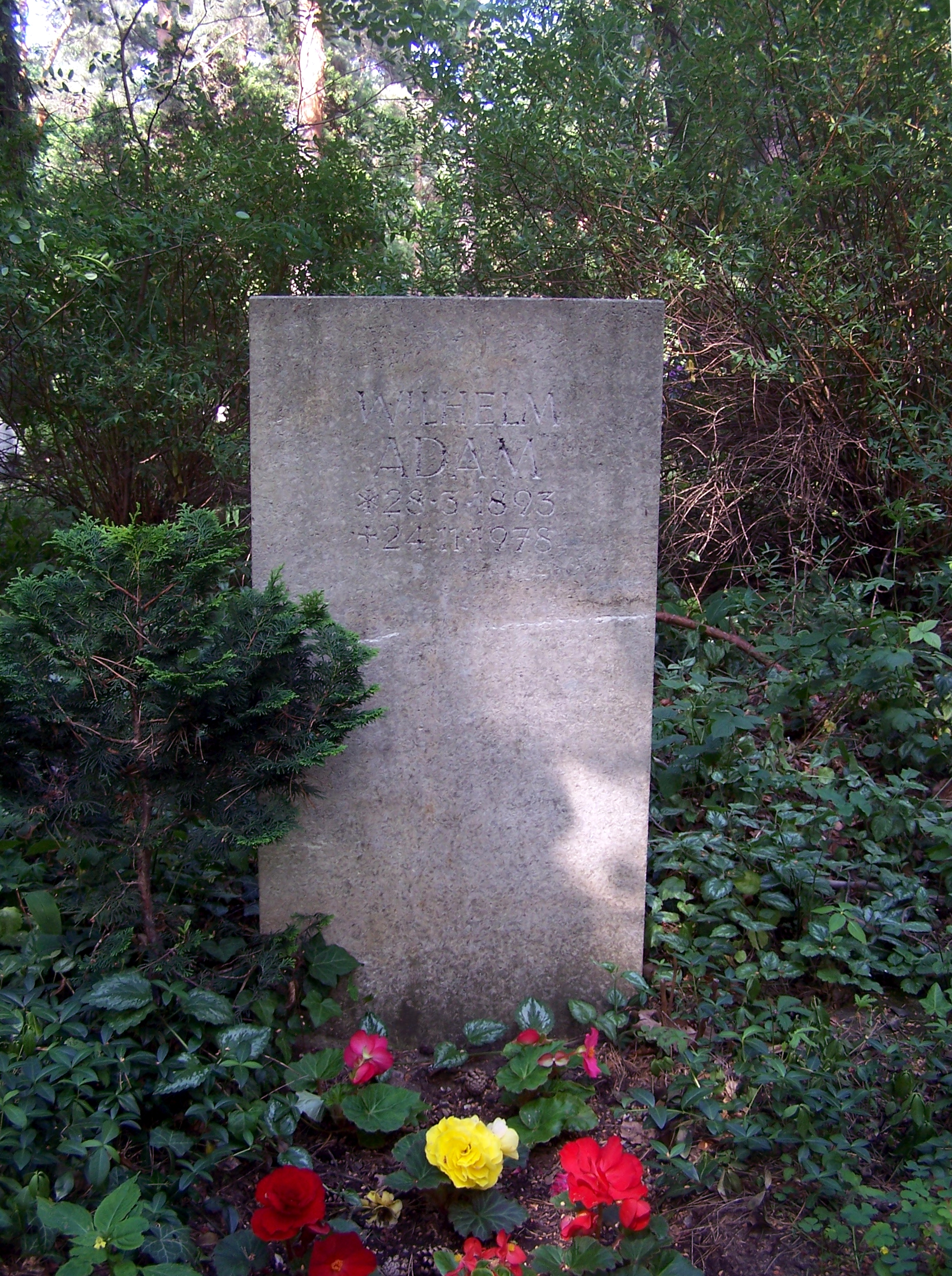 Grab von General und Politiker Wilhelm Adam (1893–1978) auf dem Heidefriedhof in Dresden